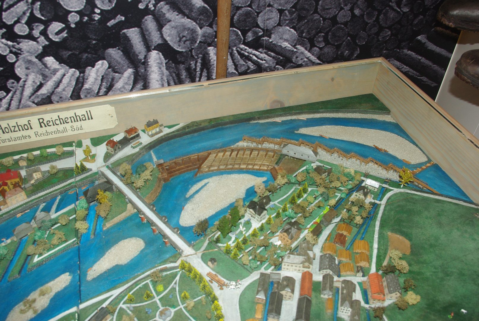 Modell der Triftanlagen im Heimatmuseum in Bad Reichenhall; angefertigt 1906 durch Forstmeister Strehle, restauriert 1979 durd die Schreiner des Städt. Bauhofs